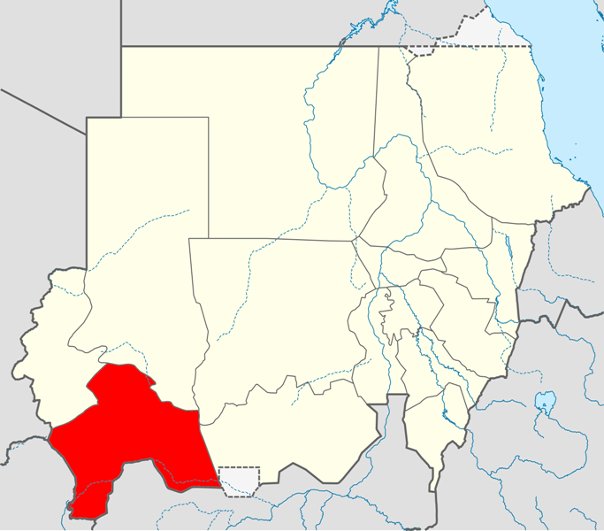 Locator map